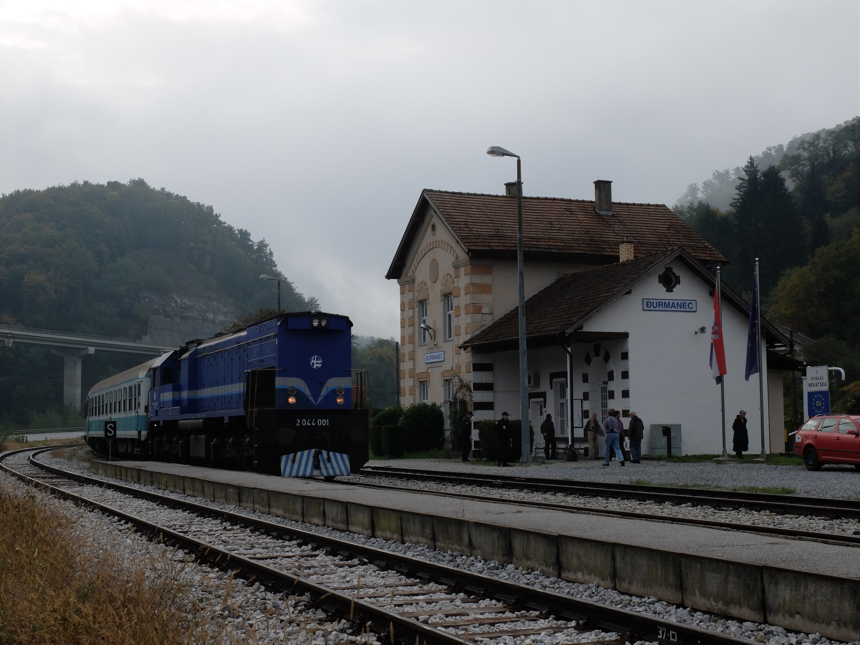 Đurmanec (Bahnhof) mit HŽ 2044 001 und Sonderzug